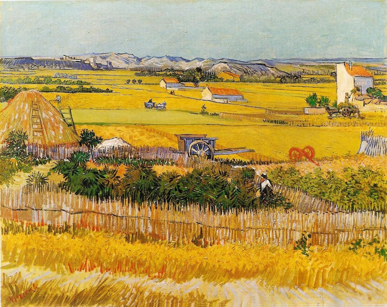 Harvest at La Crau, with Montmajour in the background, o/t, 73 x 92 cm, Van Gogh Museum in Amsterdam